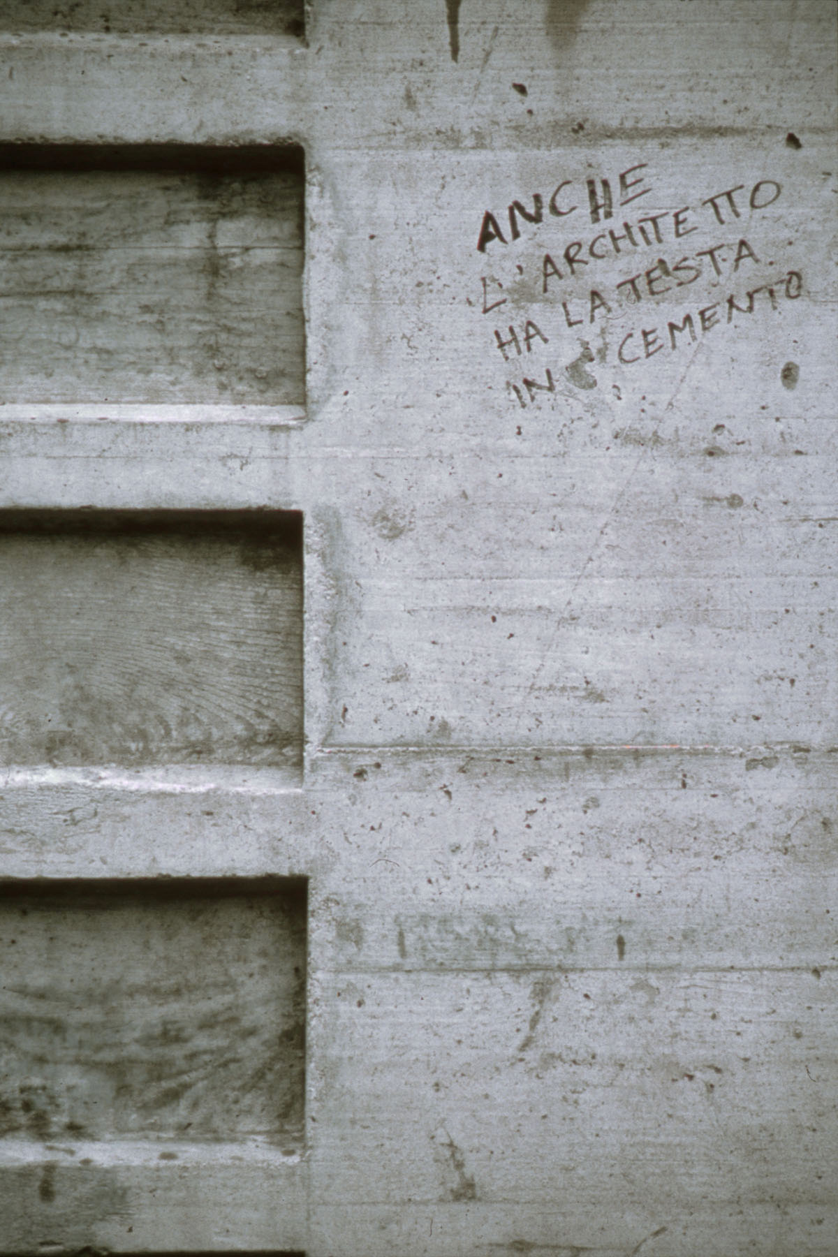 Centre de tennis à Bellinzona - arch. Aurelio Galfetti 1981-86